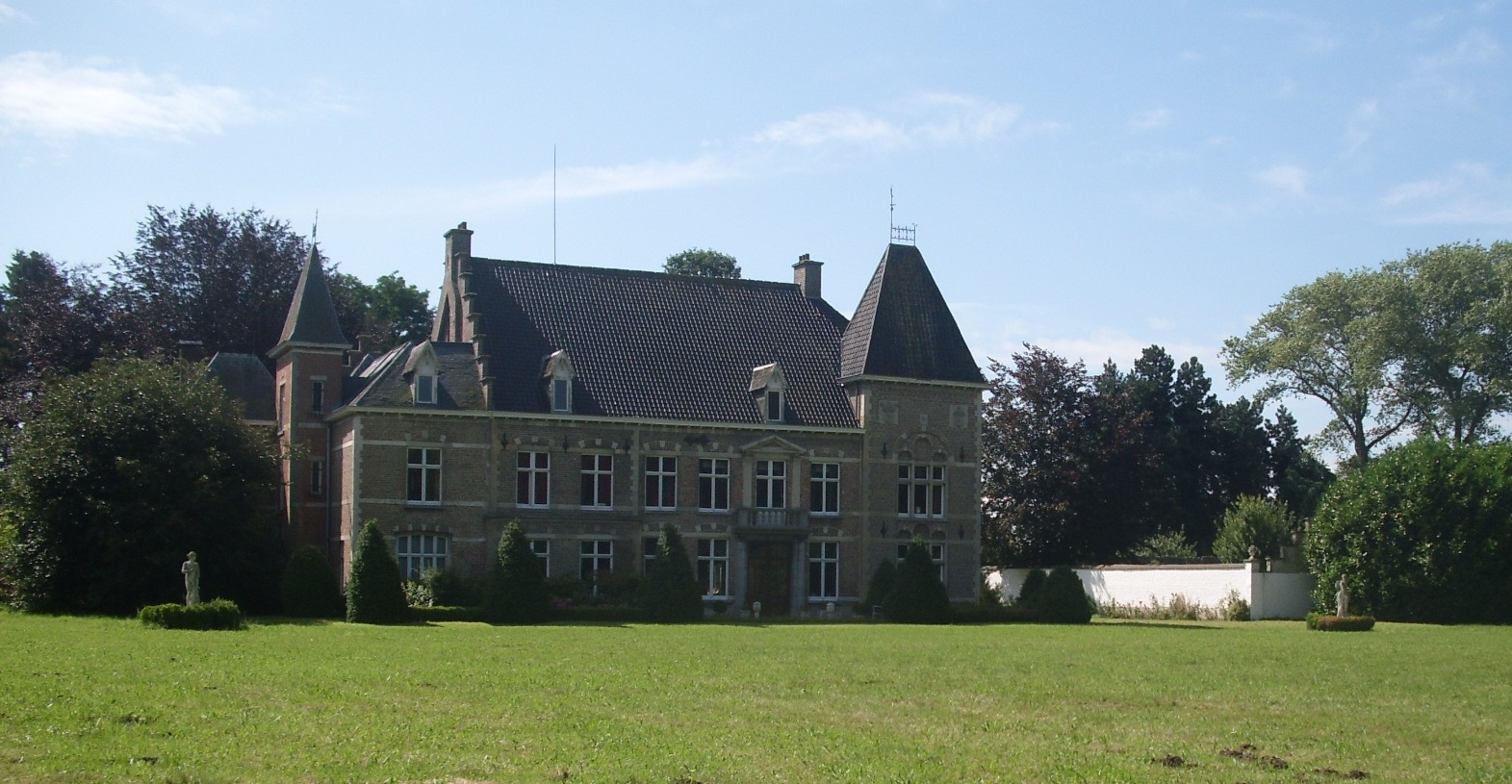 Kasteel van Moere Le bon Séjour - Beekstraat - Moere - Gistel - West-Vlaanderen - België